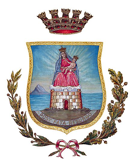 Stemma Città di Castellammare di Stabia